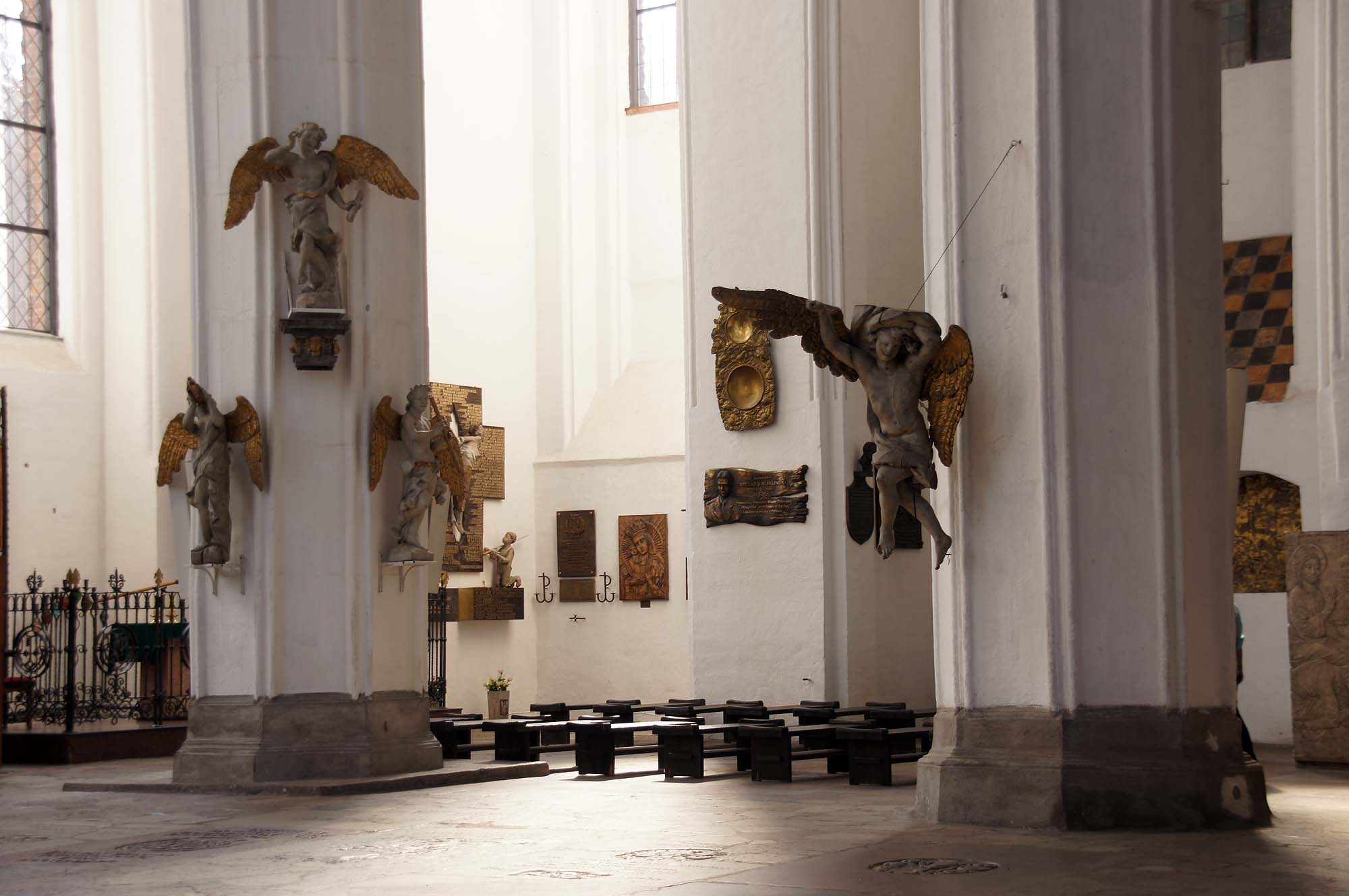 Gdańsk Główne Miasto - zespół bazyliki konkatedralnej p.w. Wniebowzięcia NMP (Kościoła Mariackiego), 1343, 1502